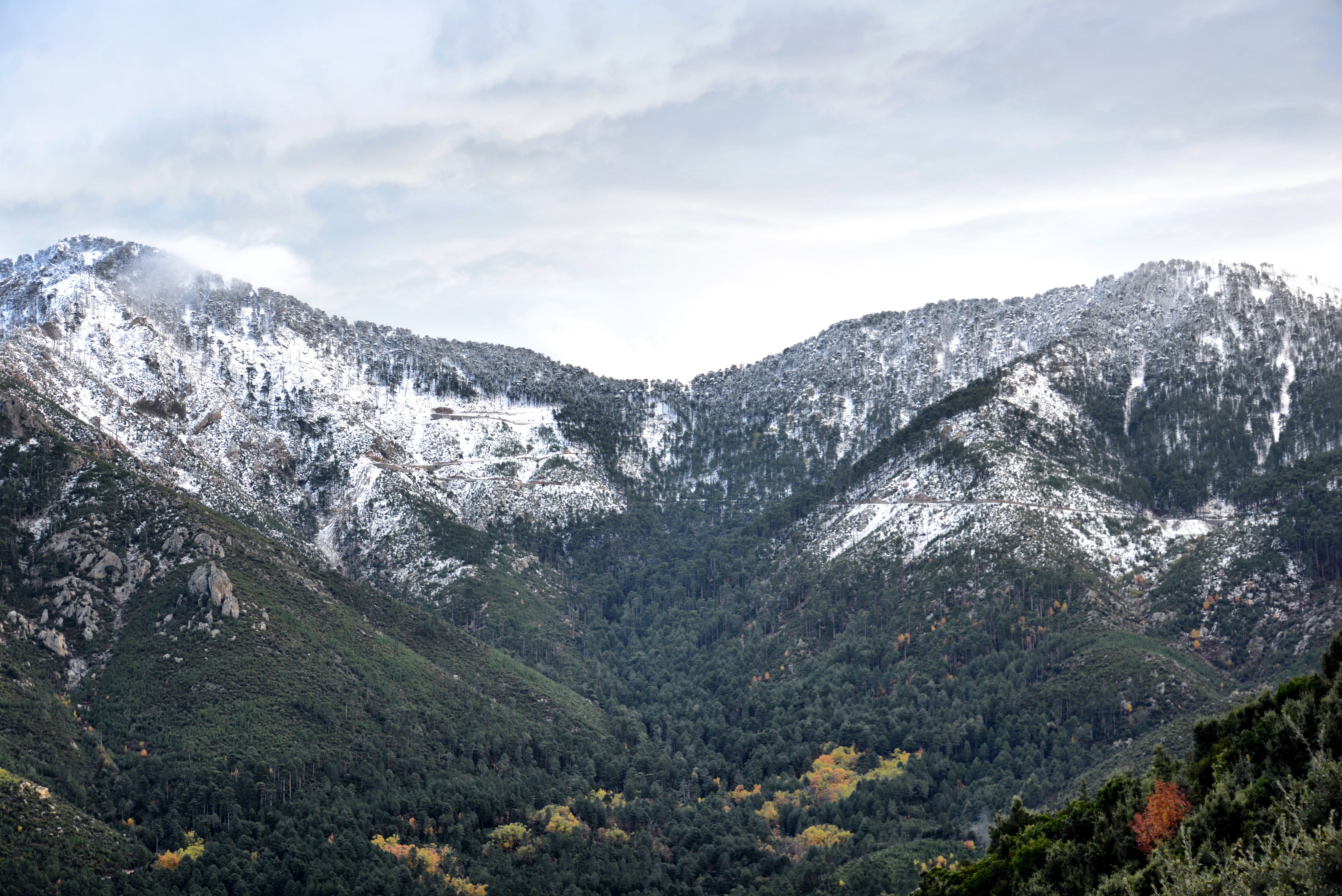 Muracciole, Centre Corse - Le col routier de Sorba (1311 m), le deuxième plus haut de l'île, « à cheval » sur Muracciole et Ghisoni.